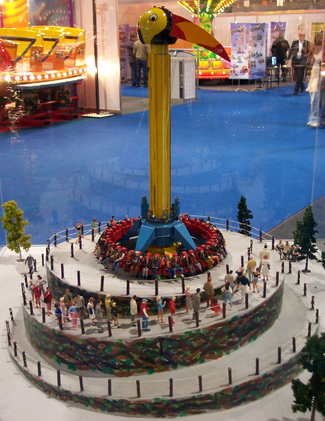 Modell vom Topple Tower am HUSS-Stand während der Euro Attractions Show